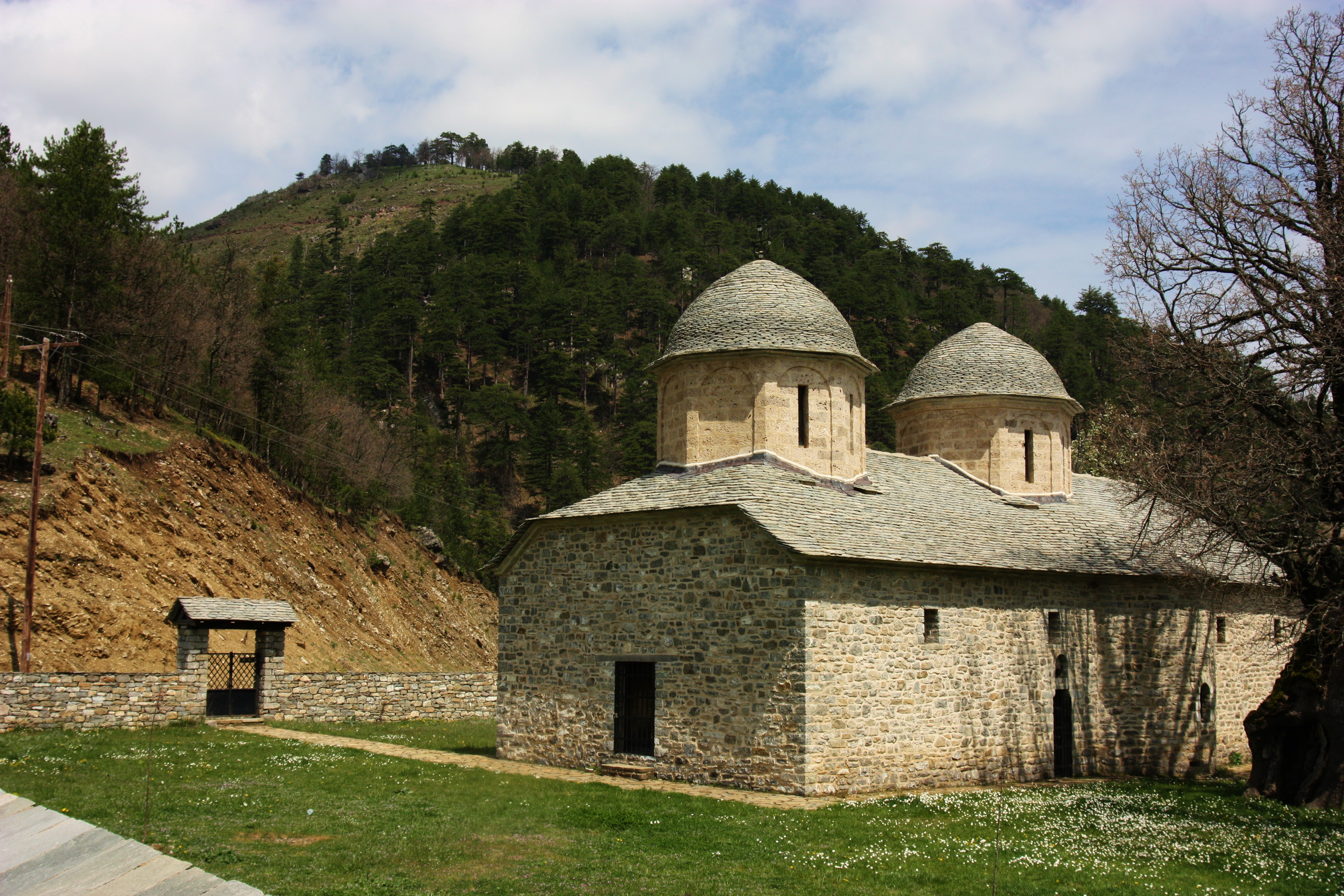 Ναός Αγίου Νικολάου στο Περιβόλι«Ναός Αγίου Νικολάου στο Περιβόλι»